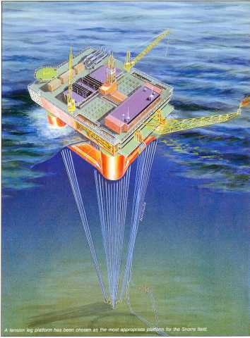 Illustrasjon av strekkstagsplatform til Snorrefeltet. En av illustrasjonene fra grafisk avdelig hos Statoil som ble gitt til Norsk Oljemuseum august 2010. Samlingen består av foto, grafiske utforminger og illustrasjoner i form av akvareller og tegninger.